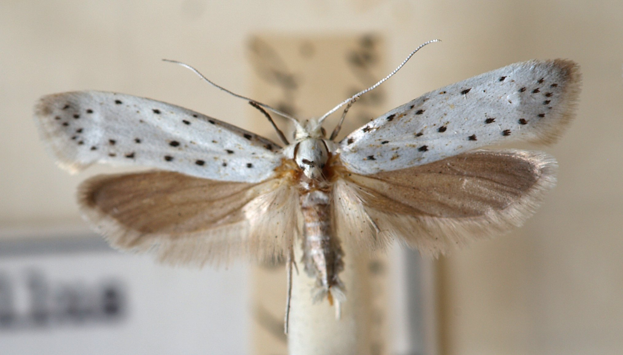 Yponomeuta malinella